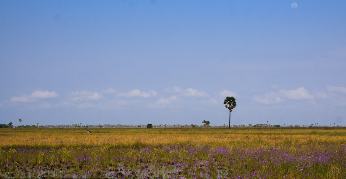 Paranthan, Sri Lanka.